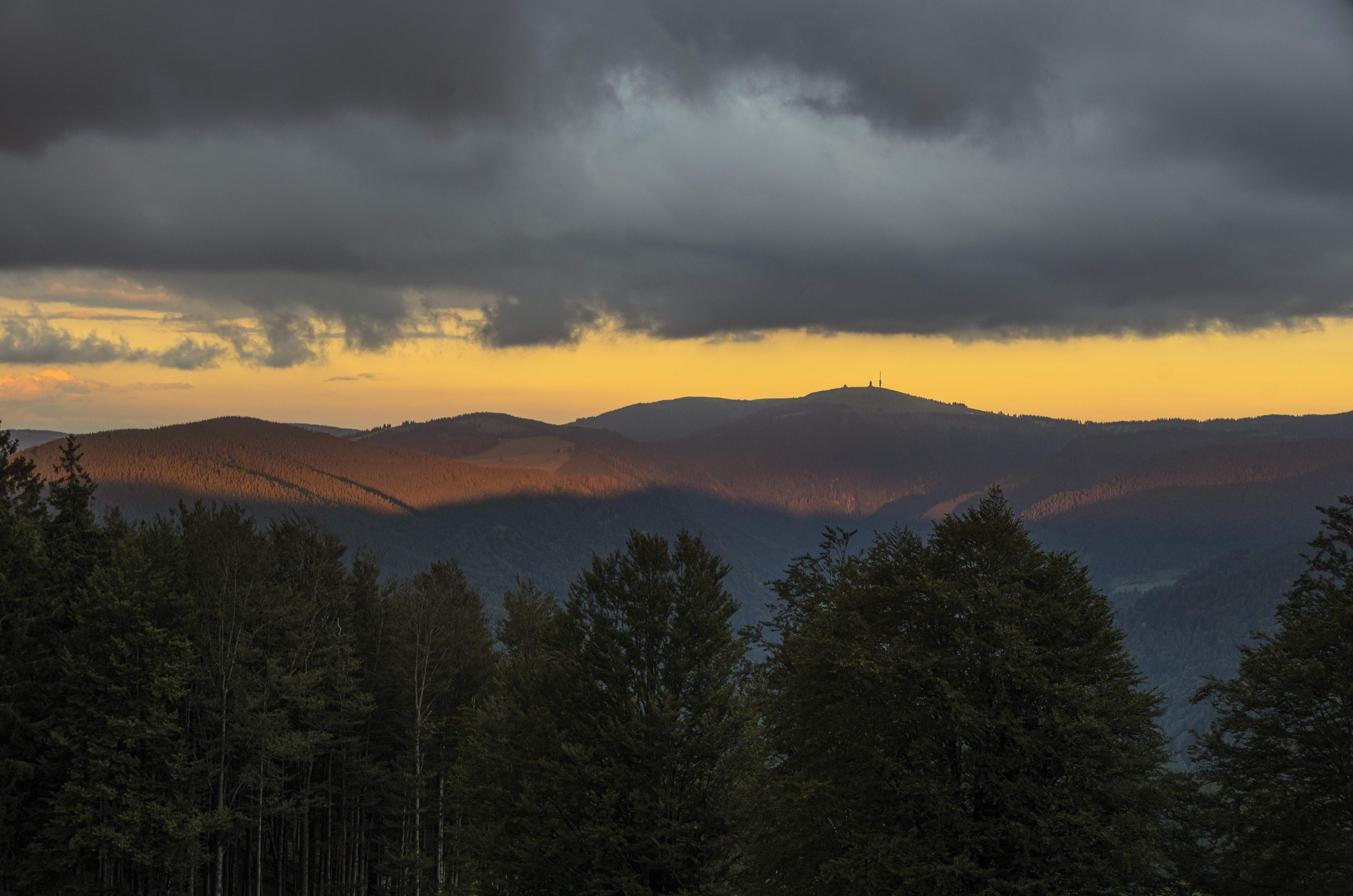 Pfad der Sinne am Schauinsland